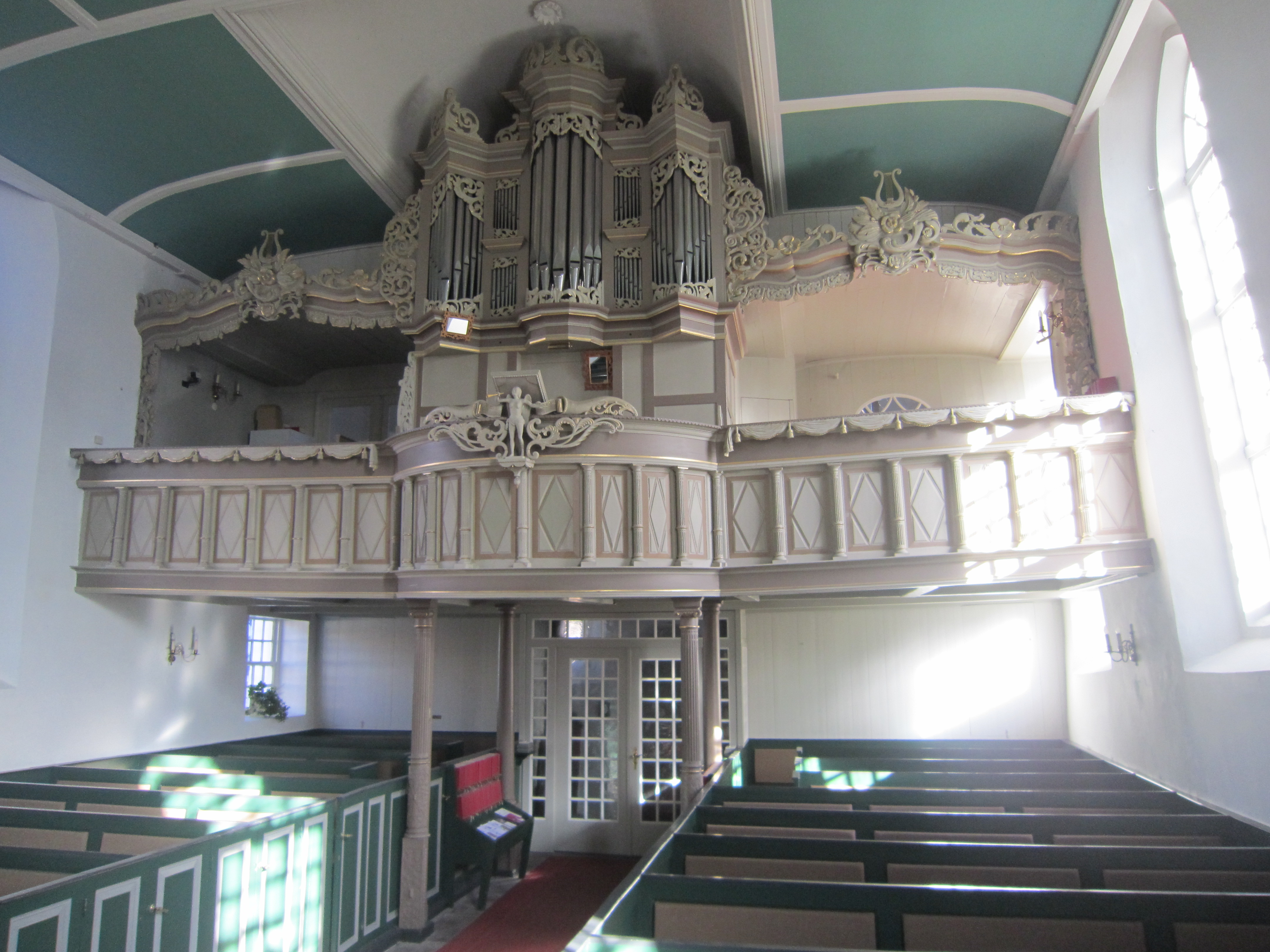 Greetsiel - Oost Friesland - Duitsland